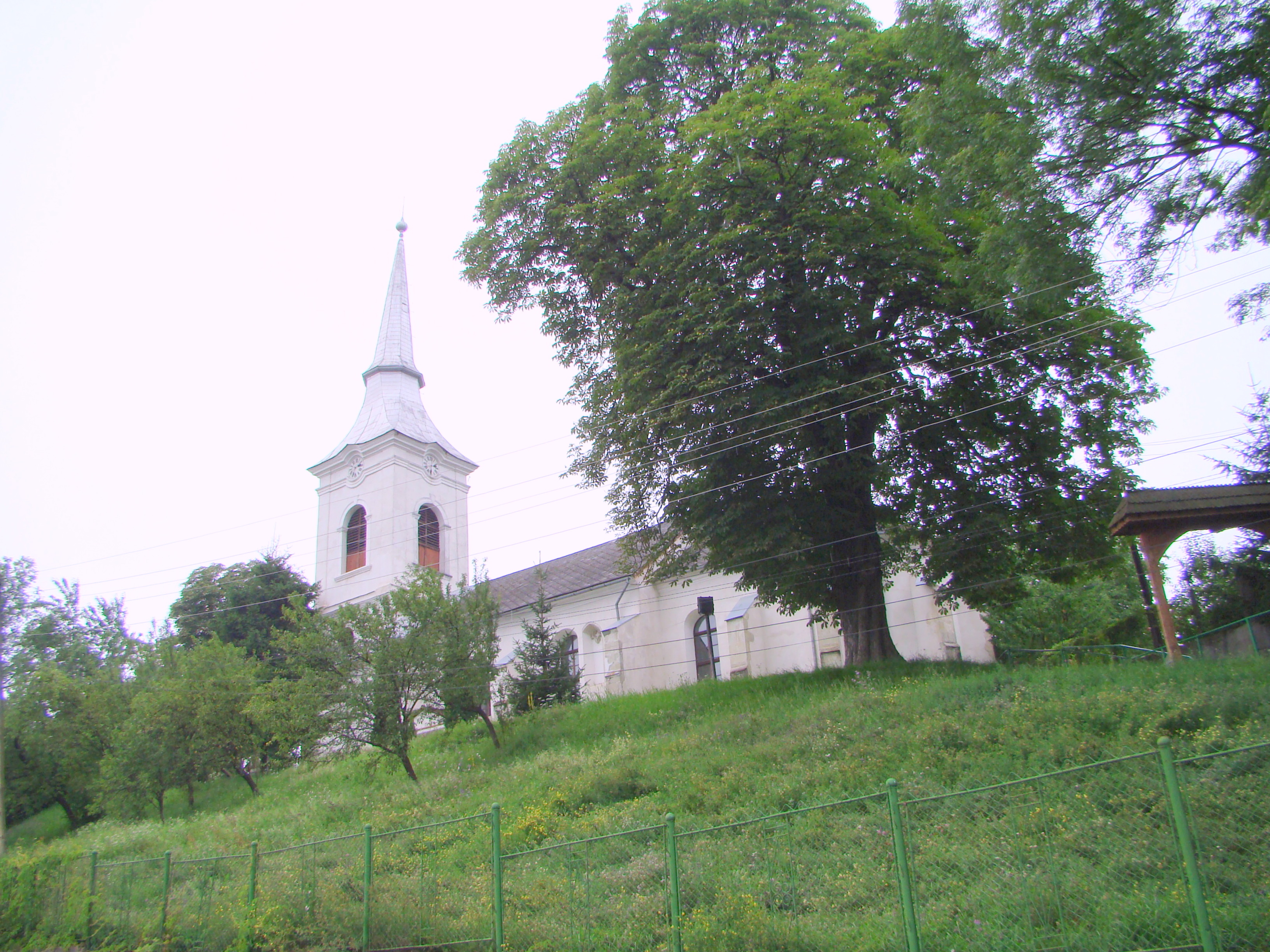 Reformed church in Reteag, Bistrița-Năsăud county, Romania